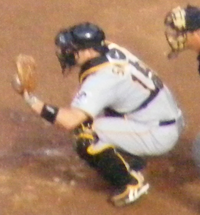 Chris Snyder